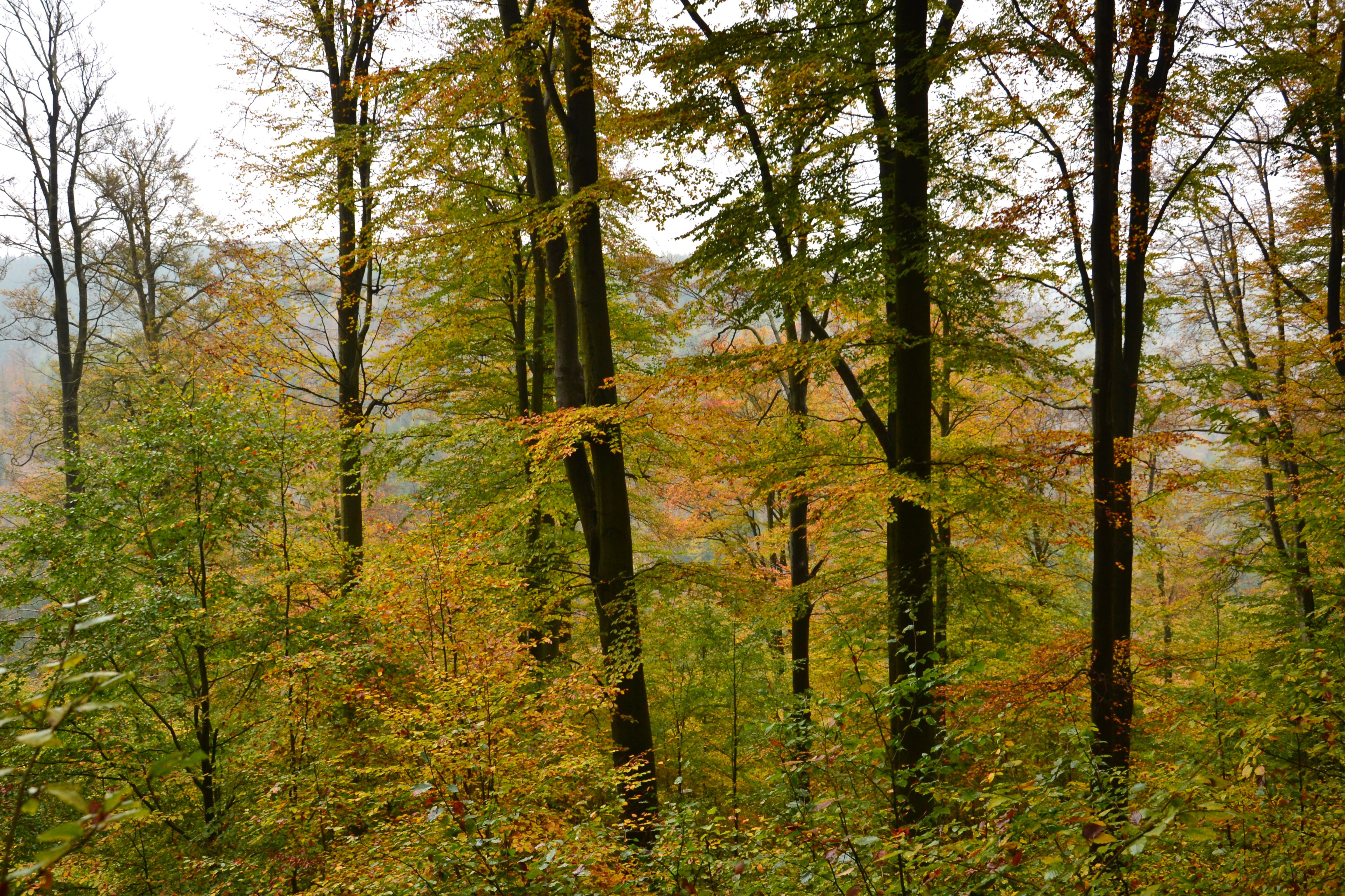 Buky nad Kameničkou - pohled do údolí